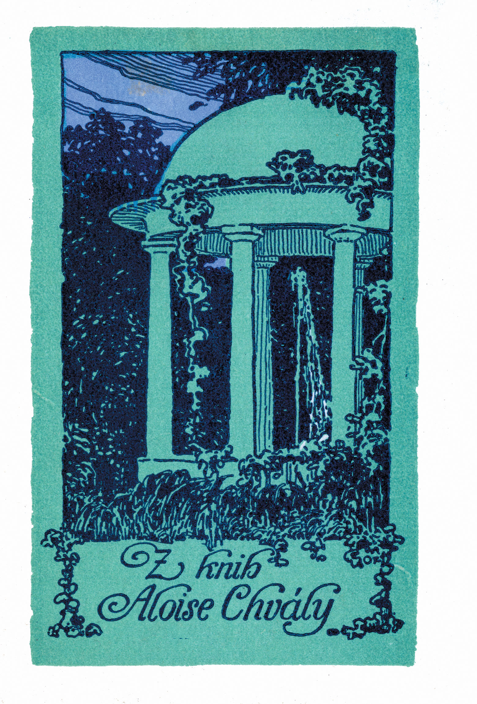 Z knih Aloise Chvály (Ex libris Alois Chvála)